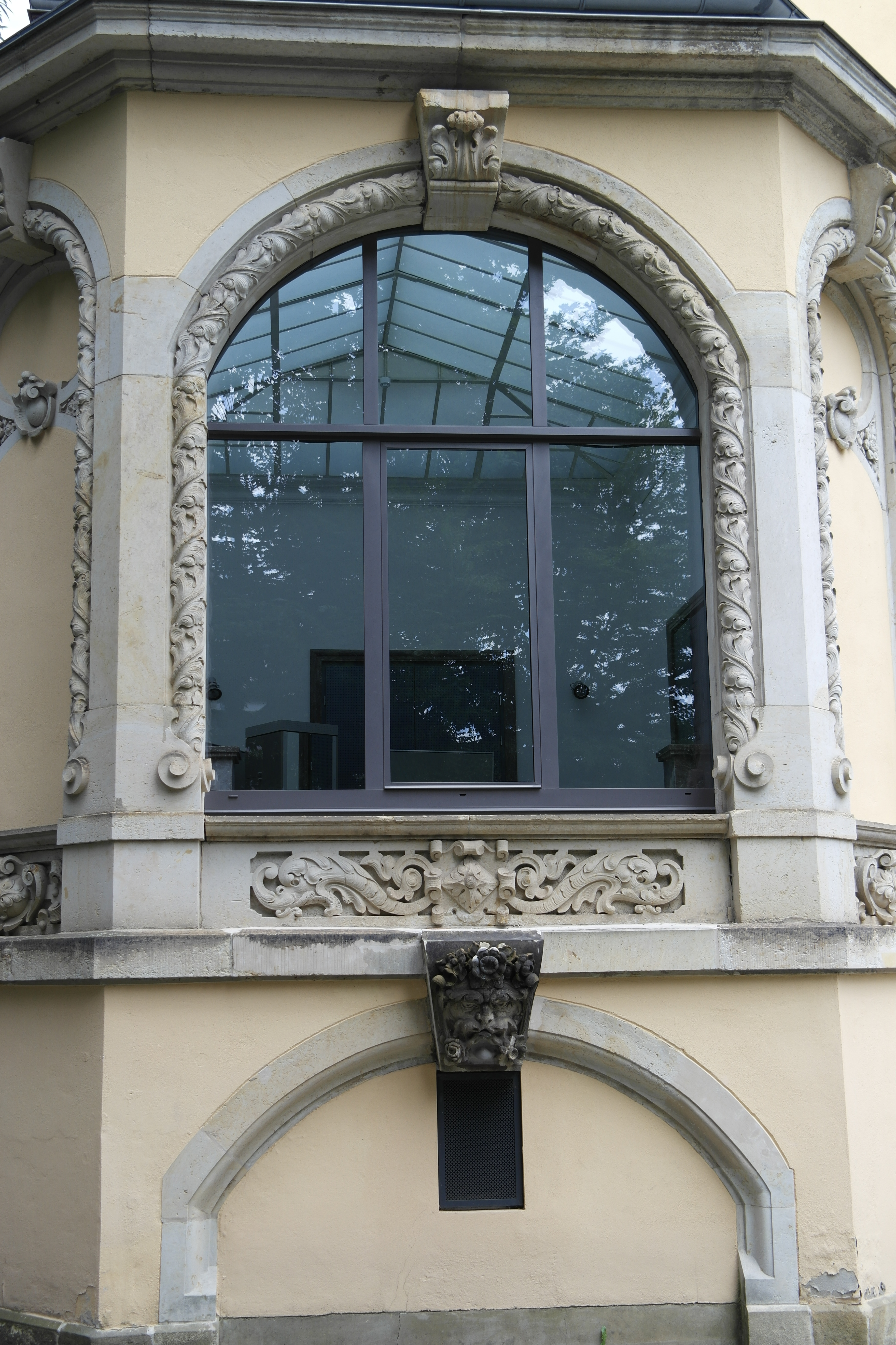 Fenster mit darunter befindlichen Wasserbrunnen (außer Betrieb)